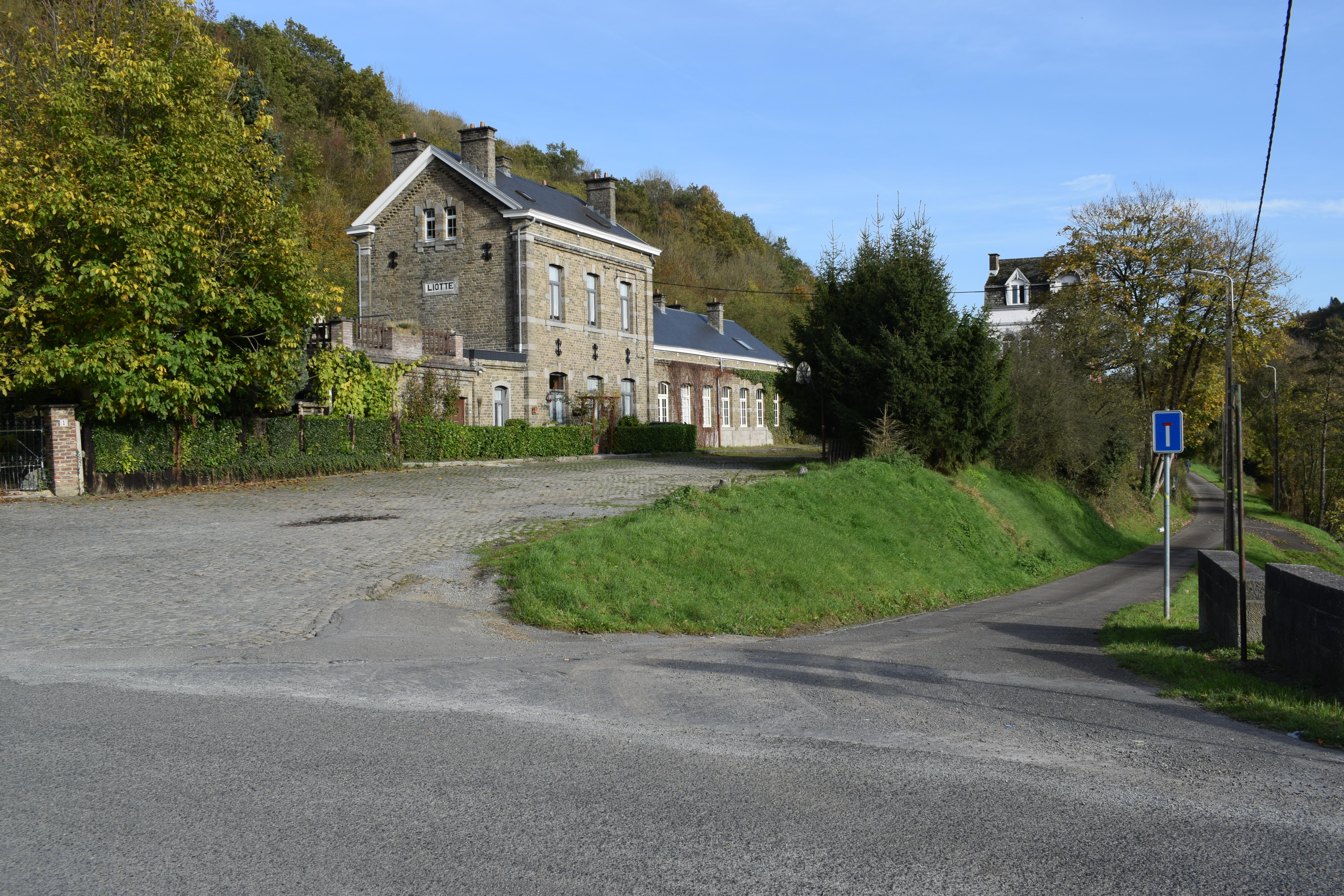 Vue des bords de l'Ourthe entre Rivage et Comblain-au-Pont, sur l'itinéraire du RAVeL (réseau de voies lentes pour cyclistes et piétons) en province de Liège (Belgique).